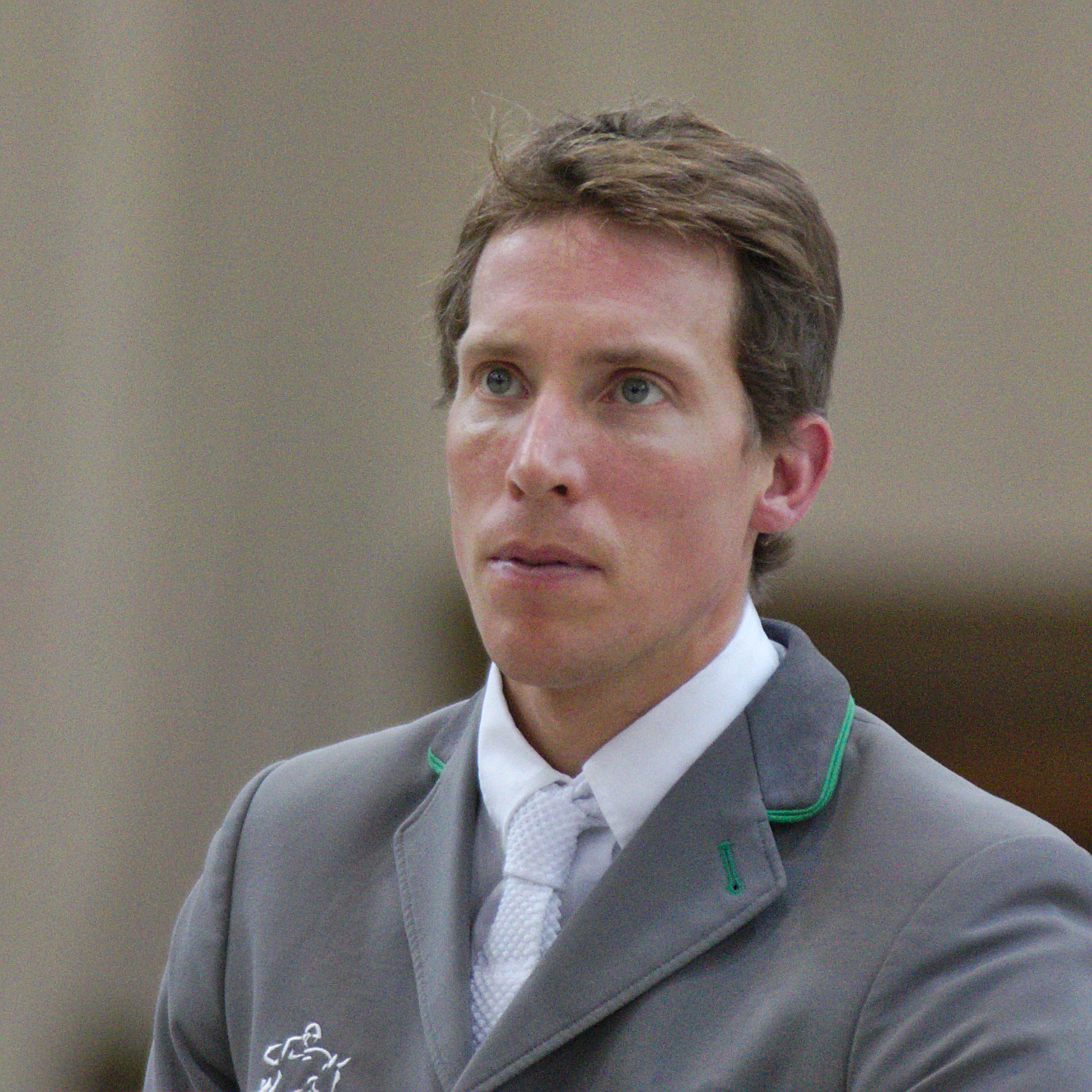 54eme CHI de Genève - 20141213 - Coupe de Genève - Henrik Von Eckermann